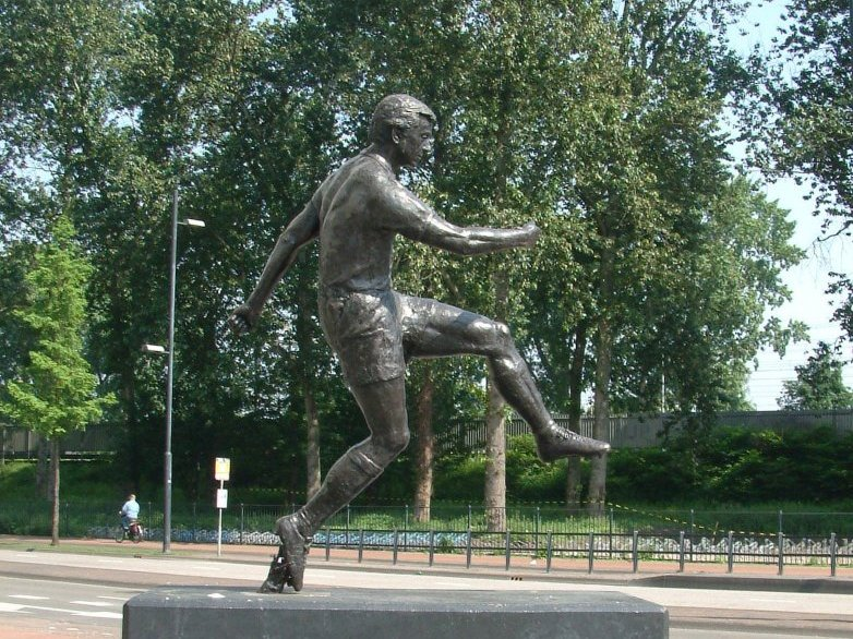 Willy van der Kuijlen